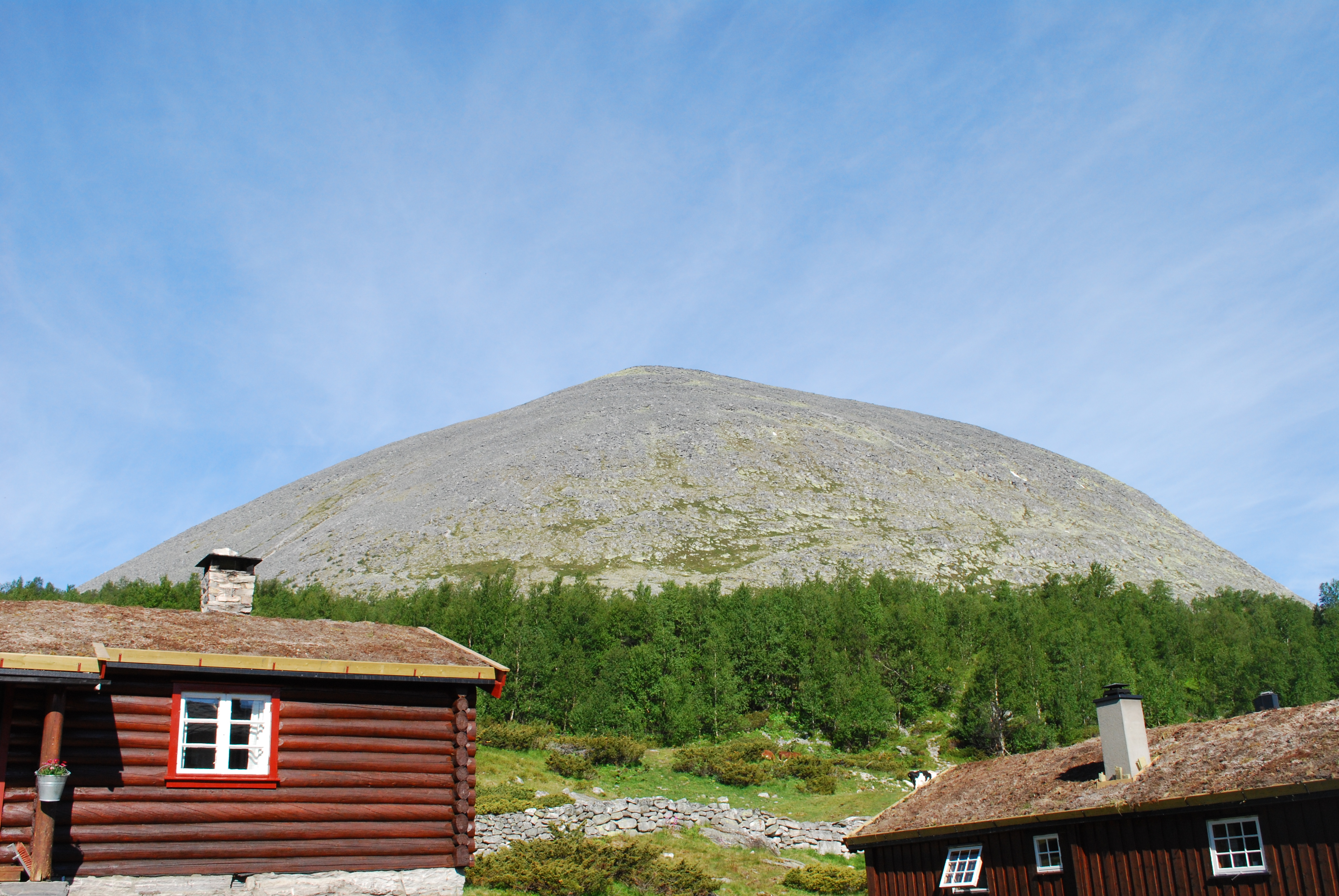 Veslsvulten er et fjell på grensen mellom Folldal kommune i Hedmark og Nord-Fron kommune i Oppland. Høyden er 1579 moh, og det er det 25. høyeste fjellet i Hedmark med en primærfaktor på minst 50 meter. Bildet er tatt fra Bjørnhollia.